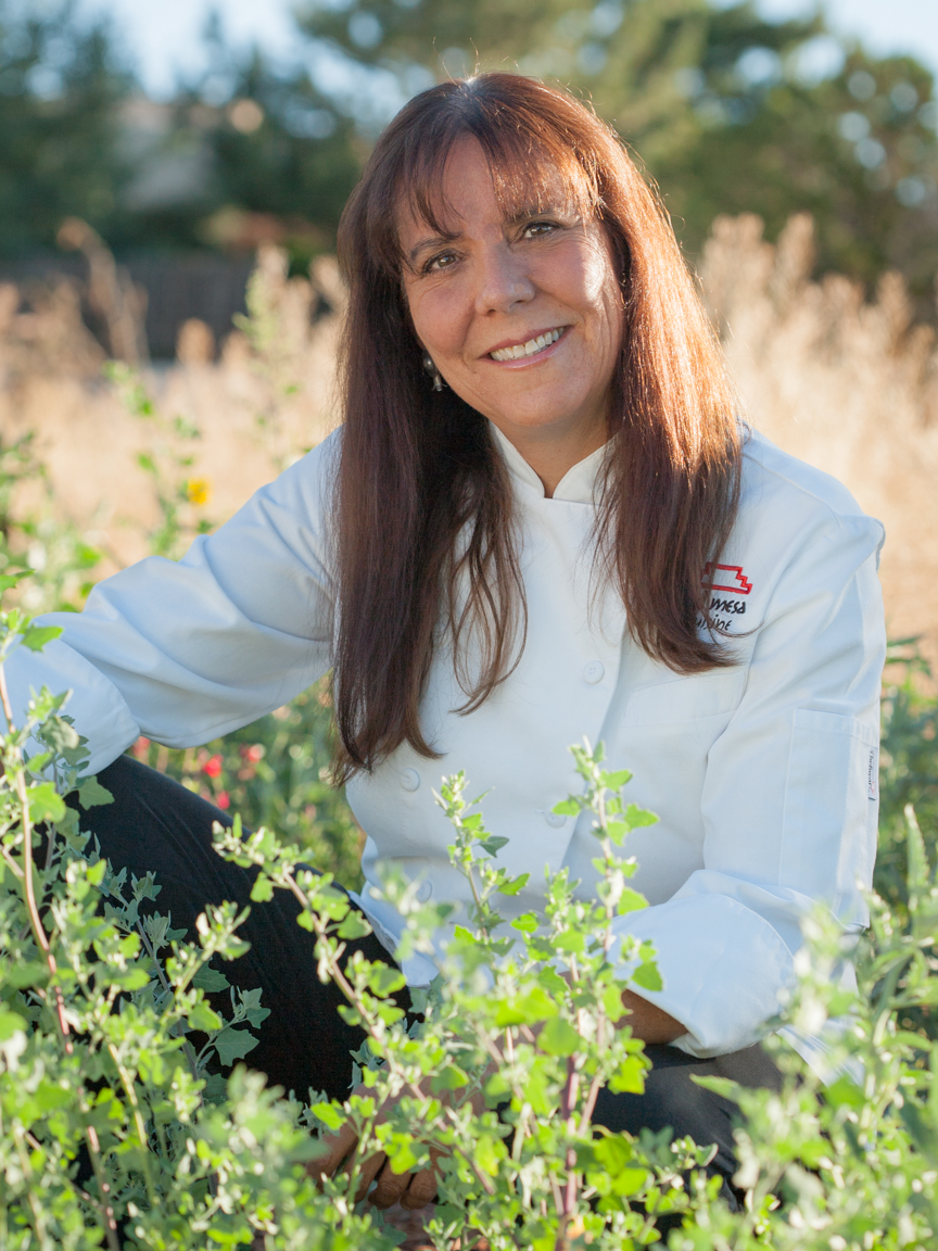 Chef Lois Ellen Frank